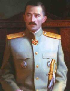 Mikhail Diterikhs (Михаил Константинович Дитерихс), Lt.-General of Russian White Army, (b.1874-d.1937)